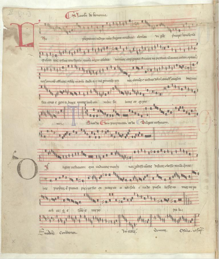 Padua, Biblioteca Universitaria 1475